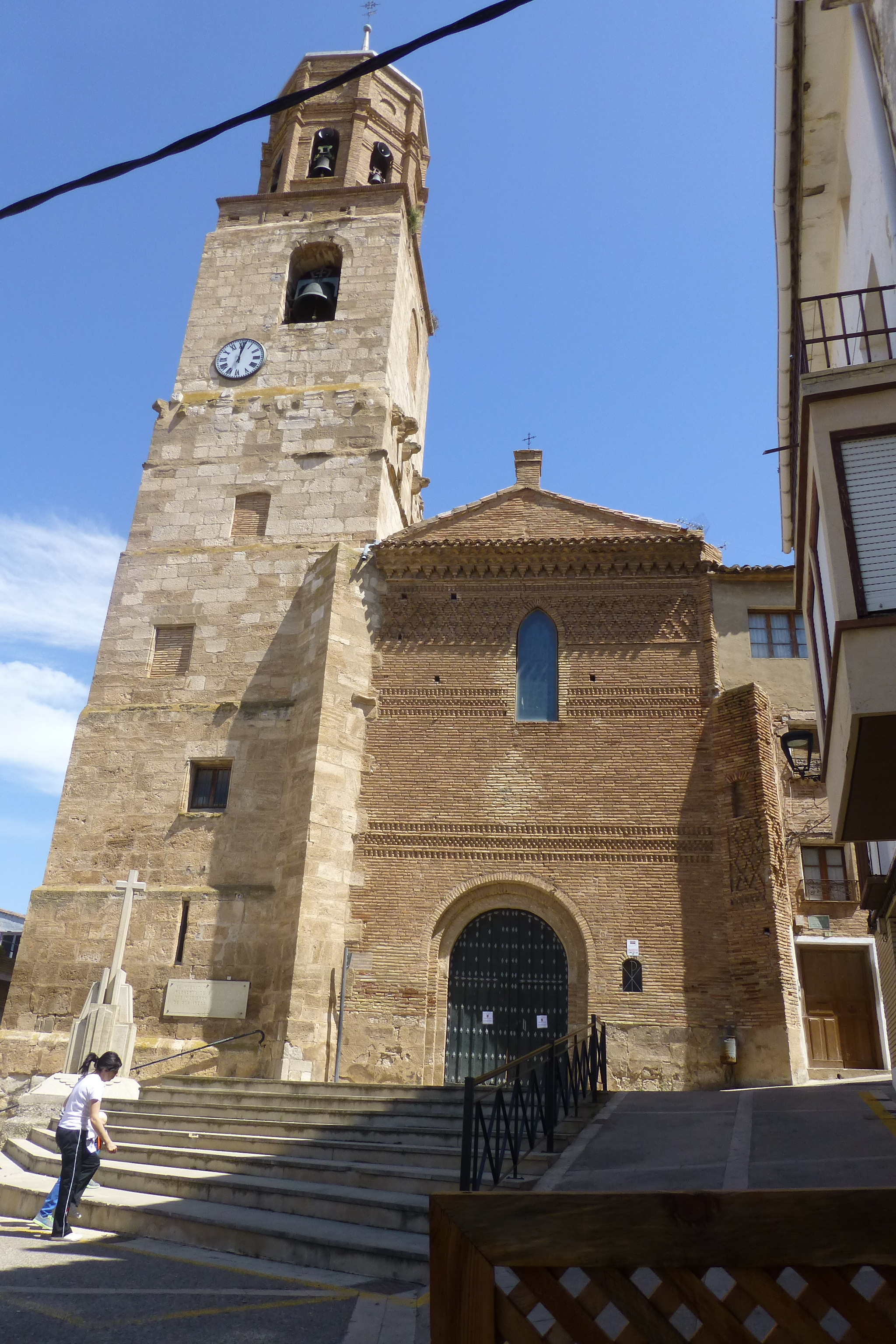 Iglesia de Santa María Magdalena en Ablitas (Navarra España)